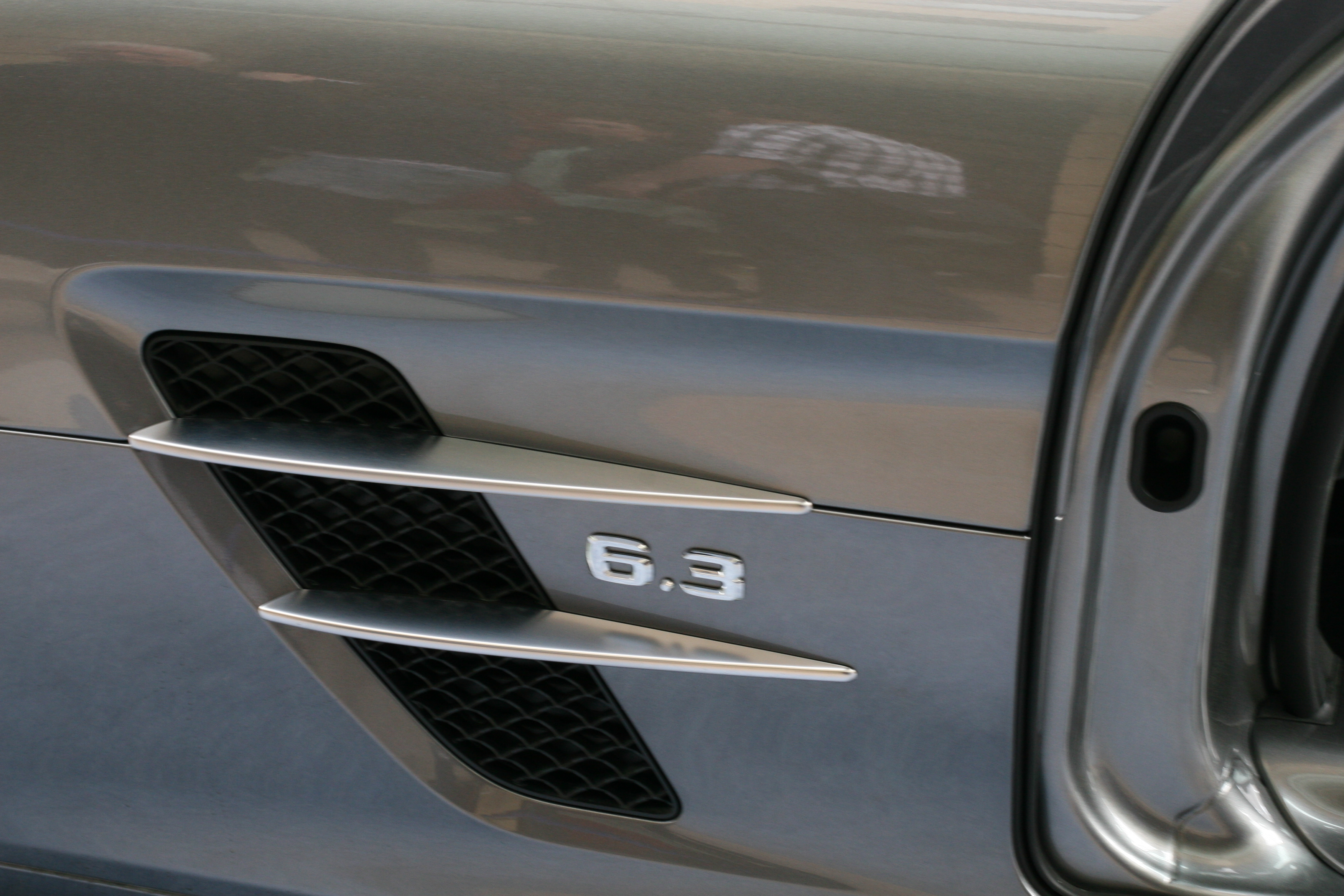 Le logo de la Mercedes SLS AMG.